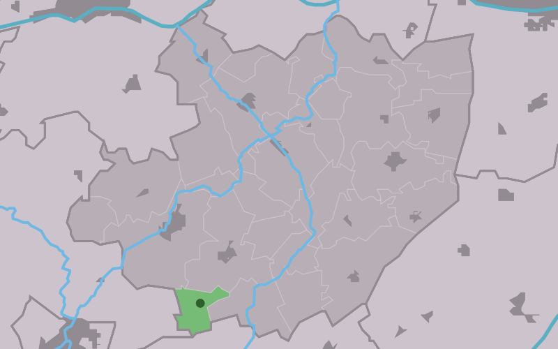 Kaartsje fan himrik fan Hidaard